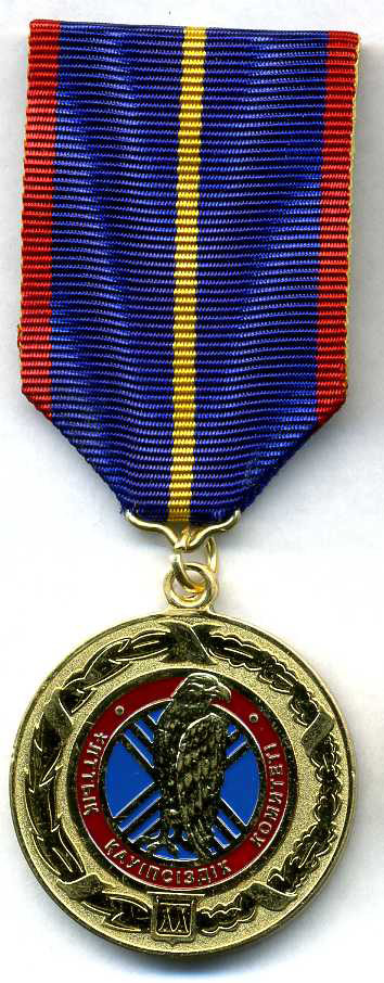 Медаль «За безупречную службу в комитете национальной безопасности» 1 степени